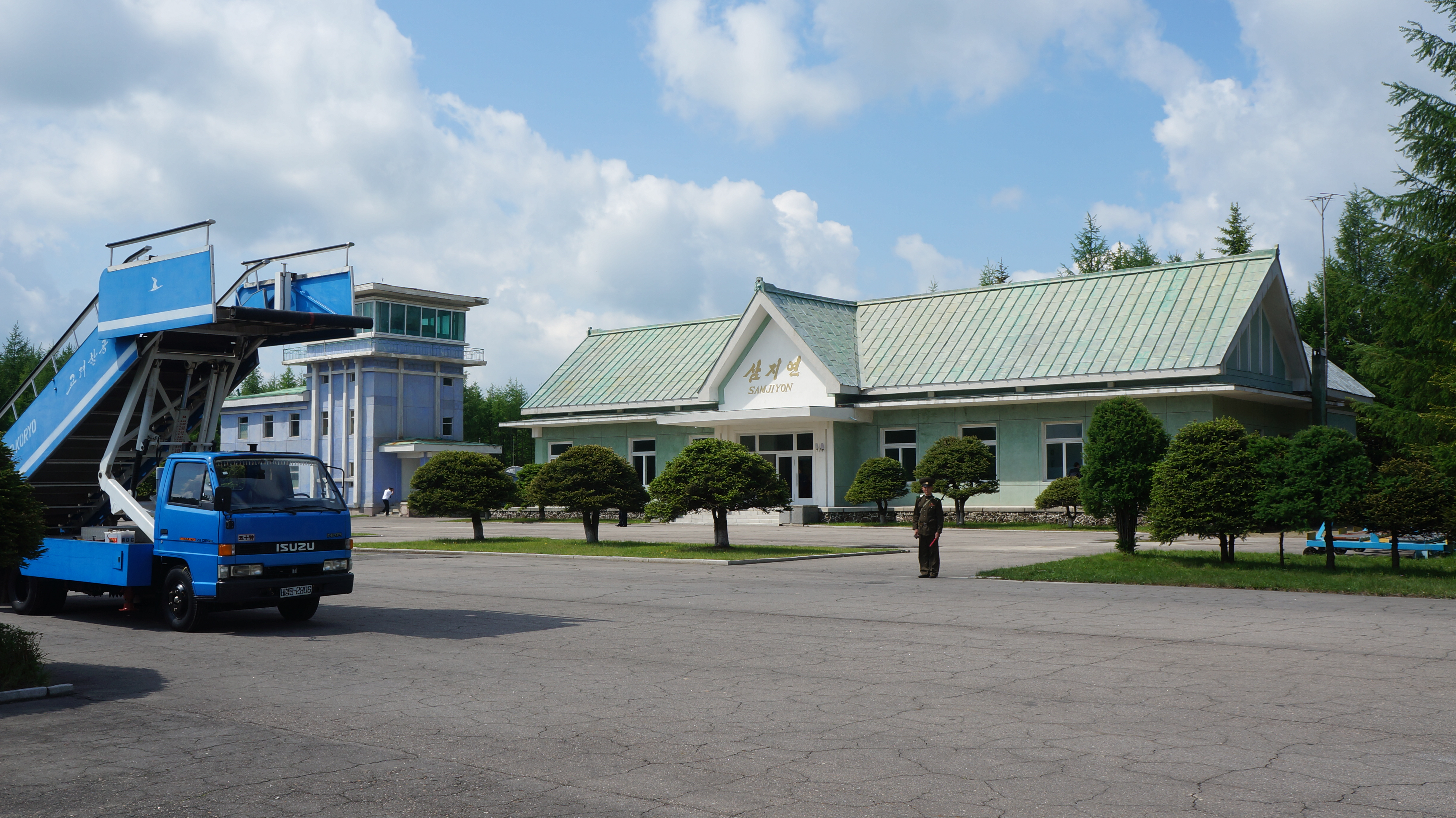 Samjiyon Airport